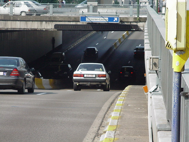 foto van de Naamsepoorttunnel in Brussel